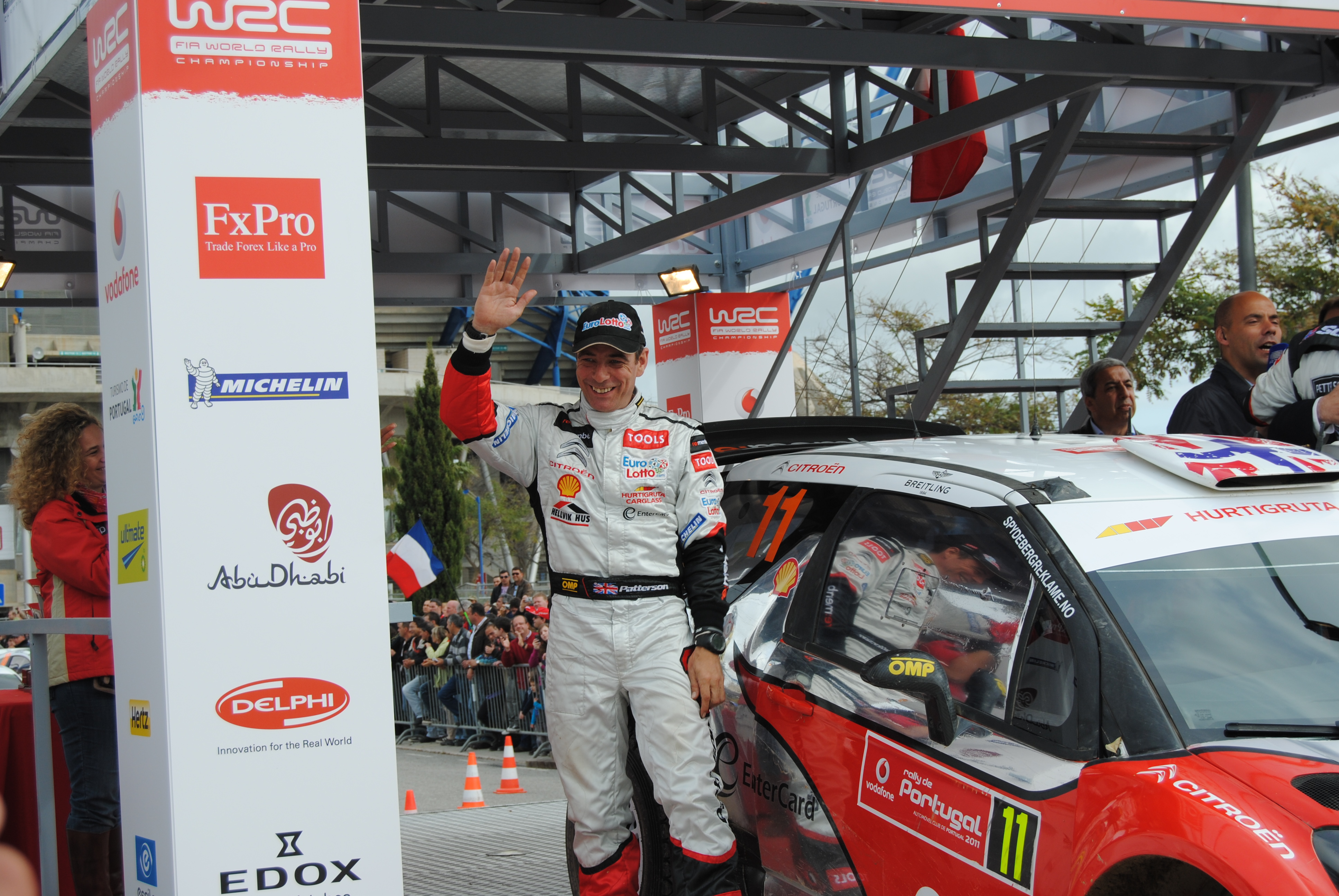 Chris Patterson Rally de Portugal 2011